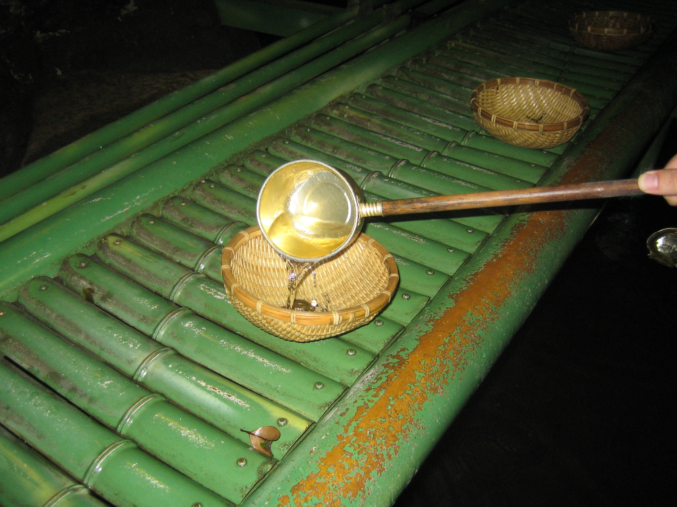 Money washed by a prayer at Zeniarai Benten Shrine (Zeniairai Benzaiten Ugafuku Jinja) in Kamakura, Japan